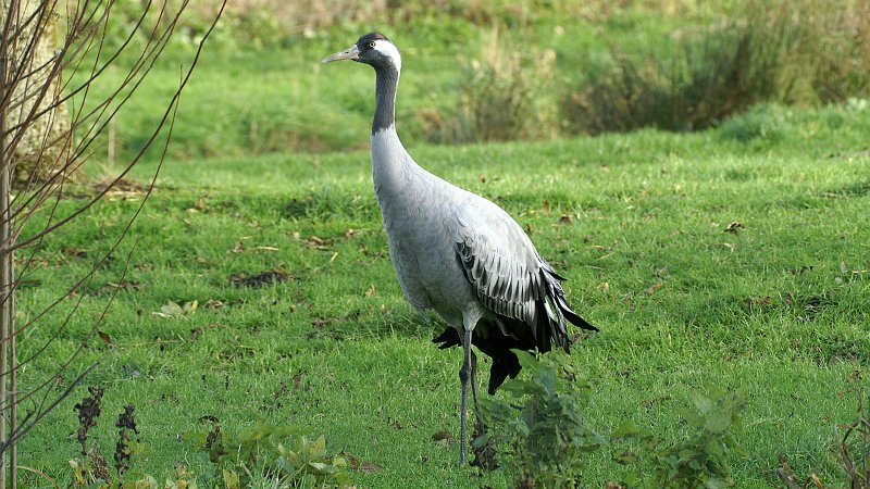 Crane (Grus grus)